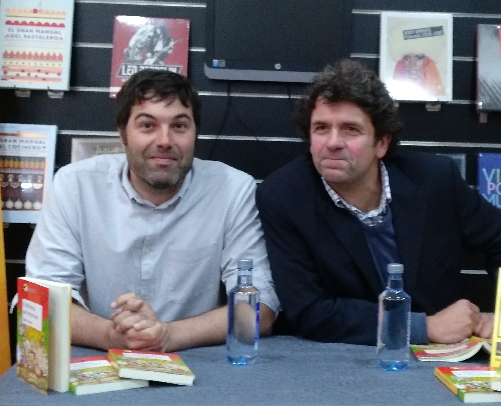 Carlos Álvarez Taboada e Enrique Mauricio Iglesias, escritores galegos de Polo Correo do vento